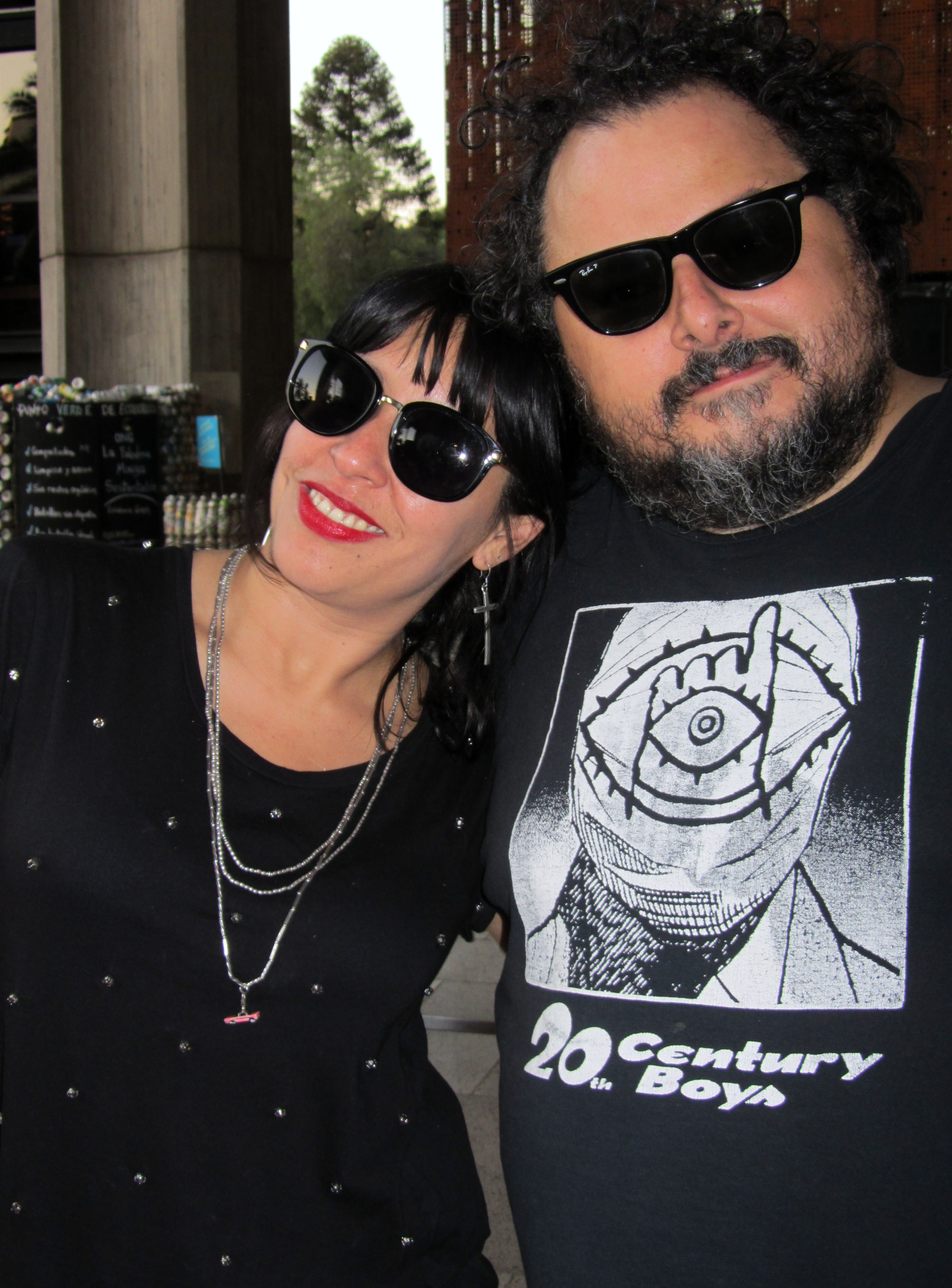 El escritor Álvaro Bisama con su esposa Carla McKay antes de la presentación del libro de Macarena Areco Cartografía de la novela chilena reciente: realismos, experimentalismos, hibridaciones y subgéneros, realizada en el Centro Cultural Gabriela Mistral el 2 de abril de 2015